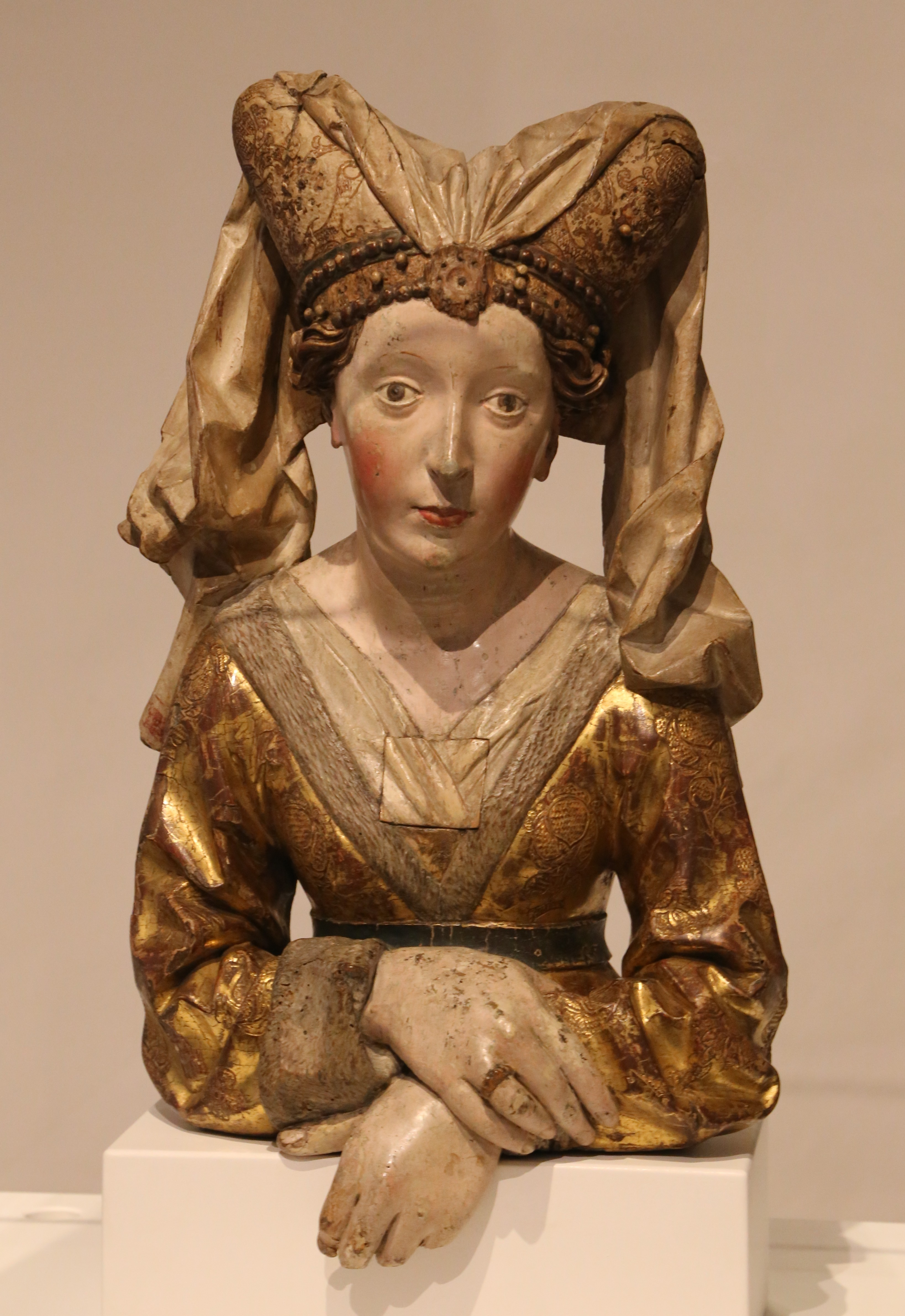 Michel Erhart: Reliquienbüste der Hl. Maria Magdalena, Ulm, um 1475-80, Lindenholz, spätgotische Fassung mit neueren Ergänzungen; Ulmer Museum Michel Erhart Alternative namesErhart, MichaelDate of birth/deathbetween circa 1440 and circa 1445after 1552Location of birth/deathUlm (?)Work locationUlmAuthority control VIAF: 45096461 LCCN: n83198675 GND: 118685147 ISNI: 0000 0000 8124 0348 WorldCat WP-Person